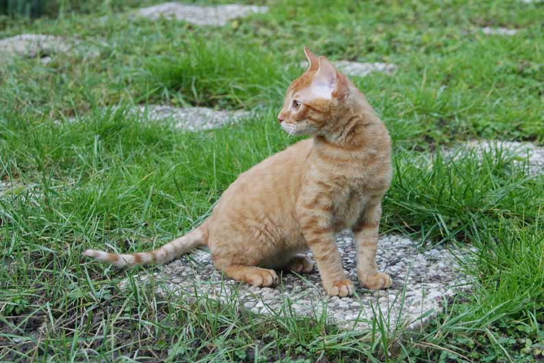 german rex